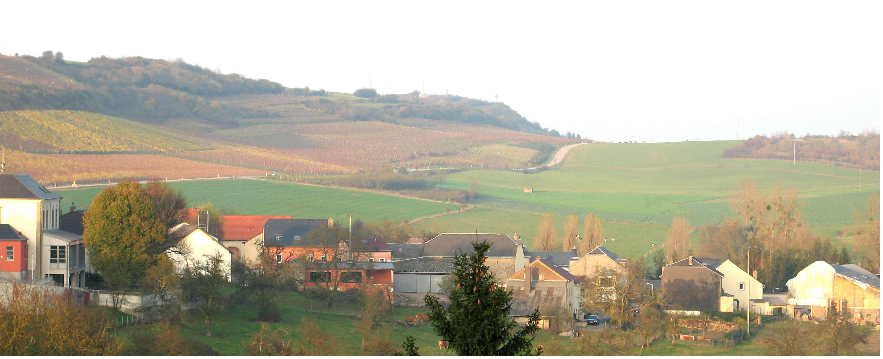 Vue op Nidderdonwen. Kategorie:Gemeng Fluessweiler